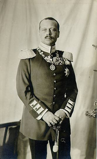 Ernst Lodewijk van Hessen